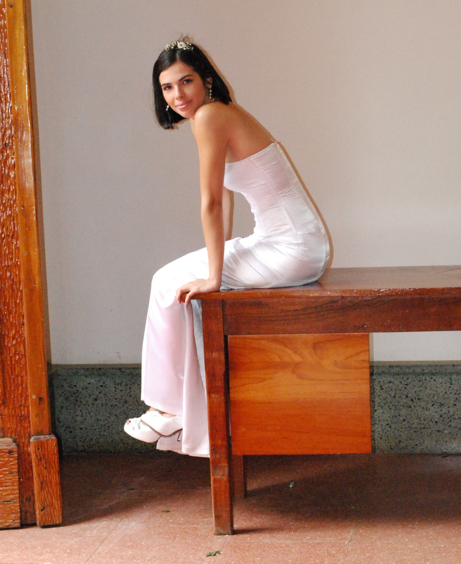 Alicia Martin en su penúltima grabación.